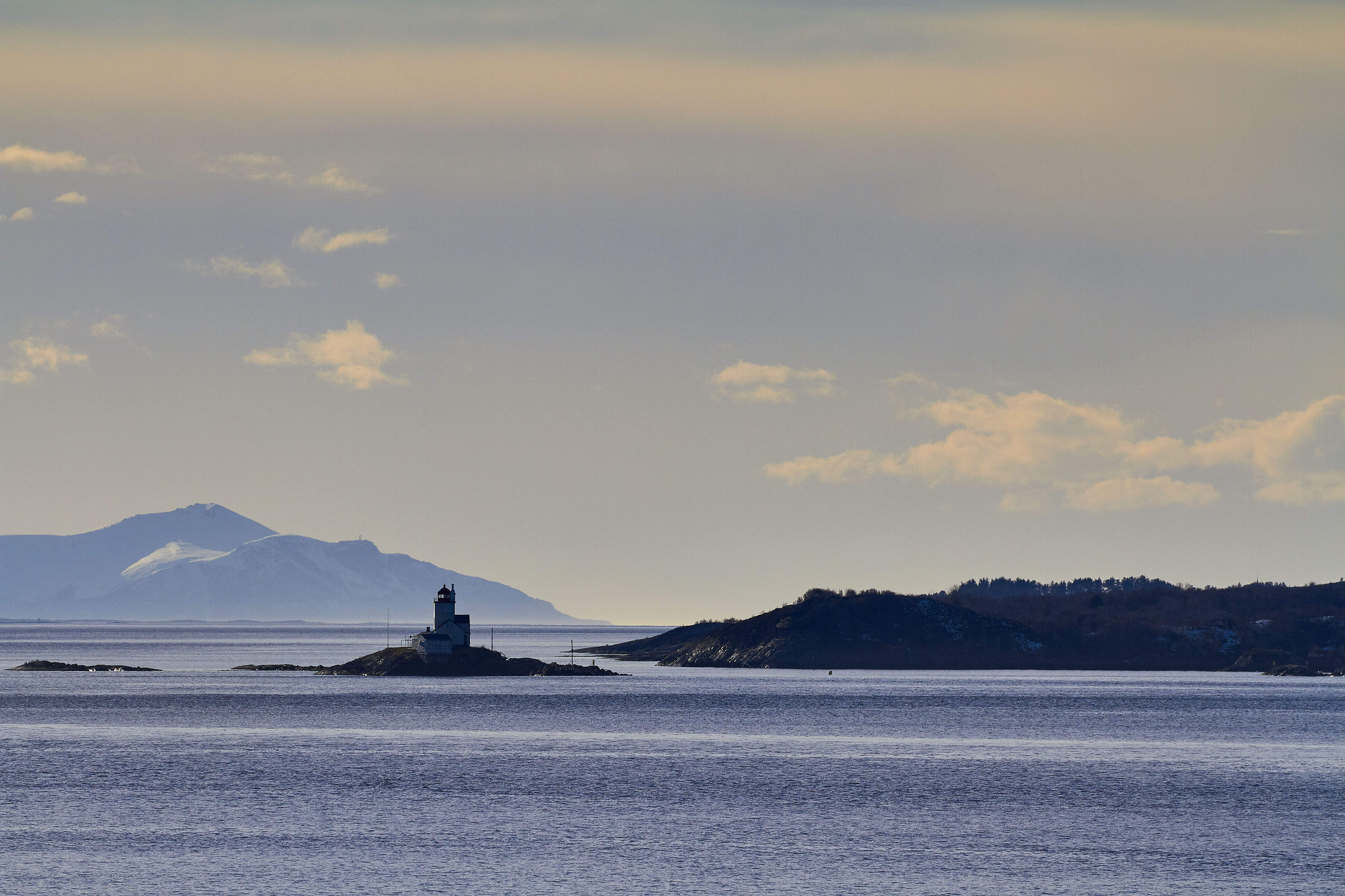 Hurtigruten 2017